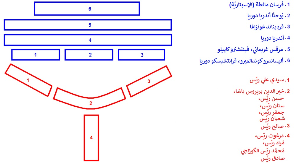 تشكيلة الأساطيل المُتحاربة في معركة بروزة سنة 1538م